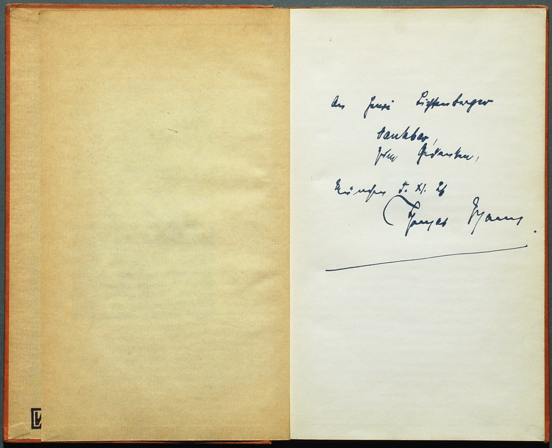 Thomas Mann: Widmungsexemplar "Pariser Rechenschaft" an den französischen Germanisten Henri Lichtenberger. Vormals Sammlung Viktor Achter.